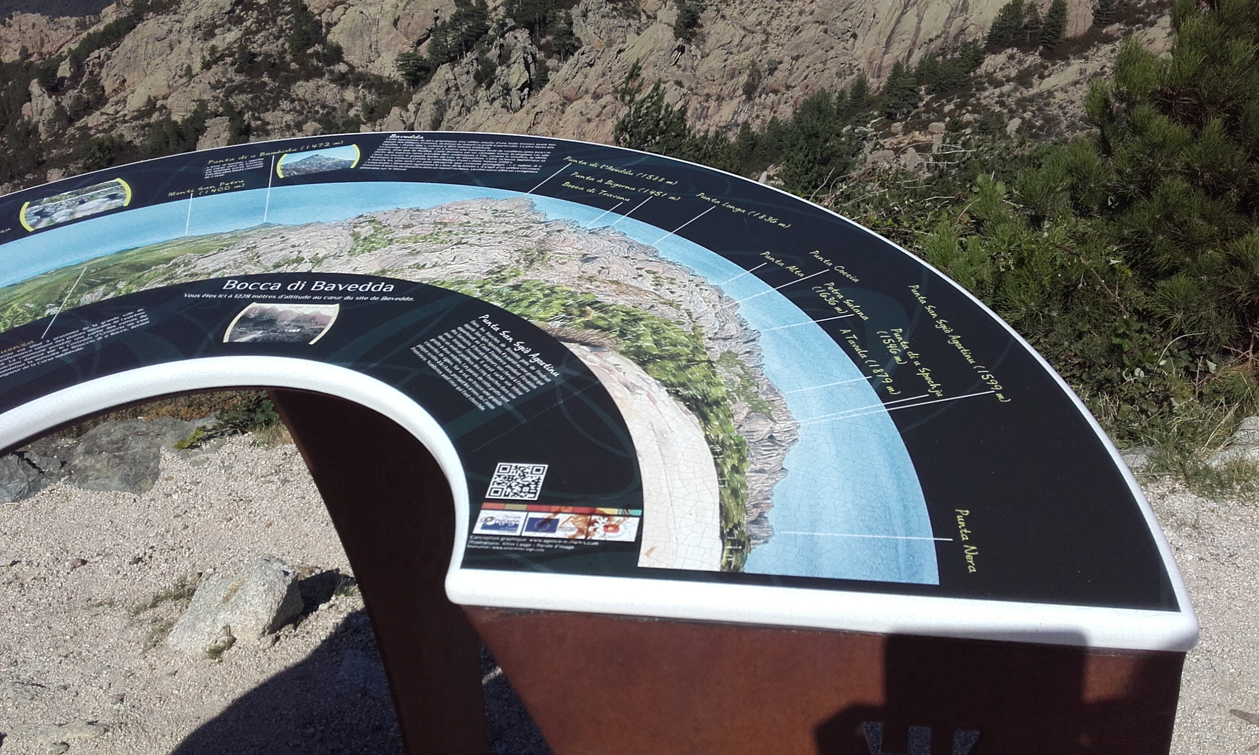 Sari (Corse) Belvédére